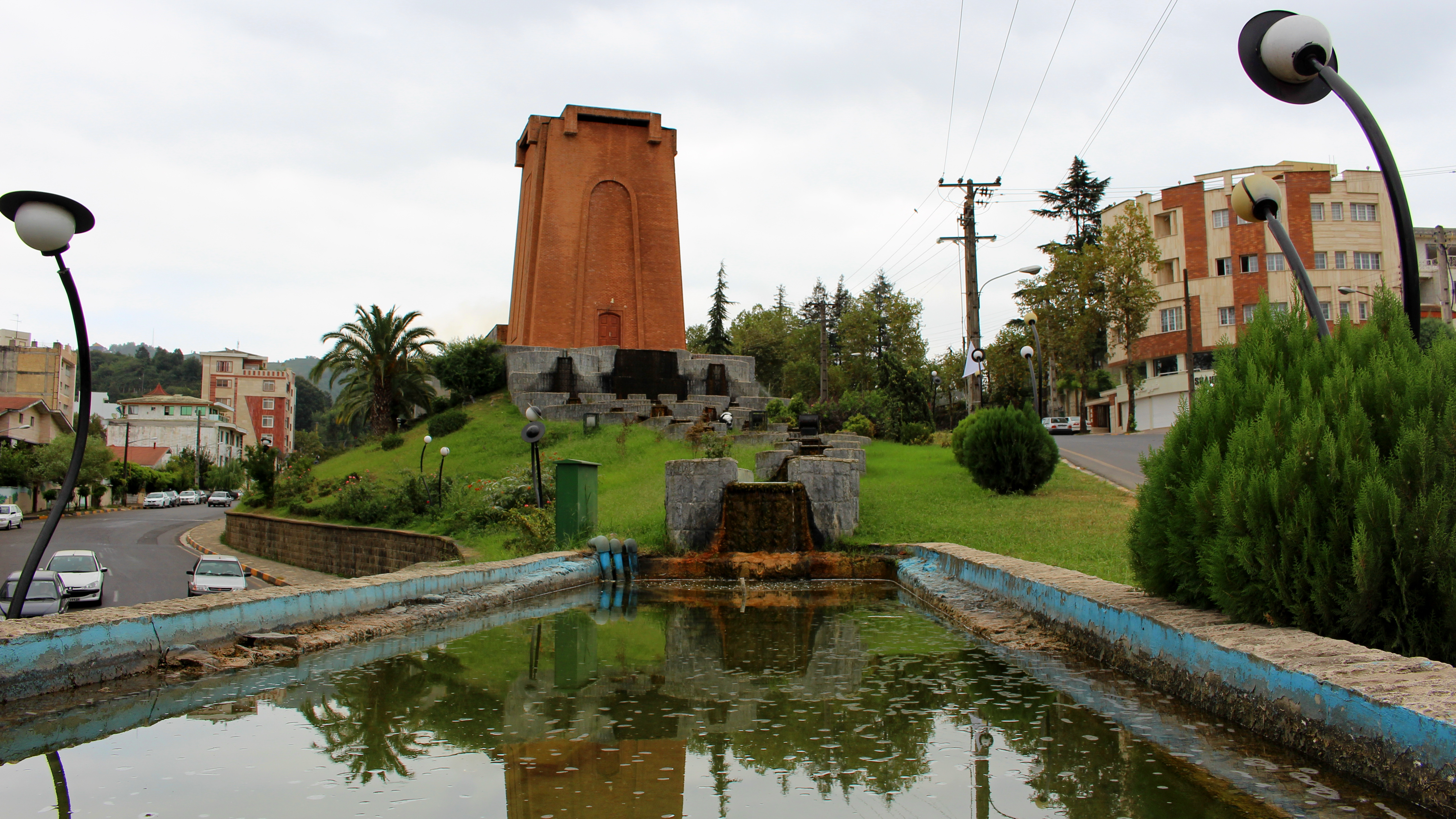 آرامگاه کاشف السلطنه